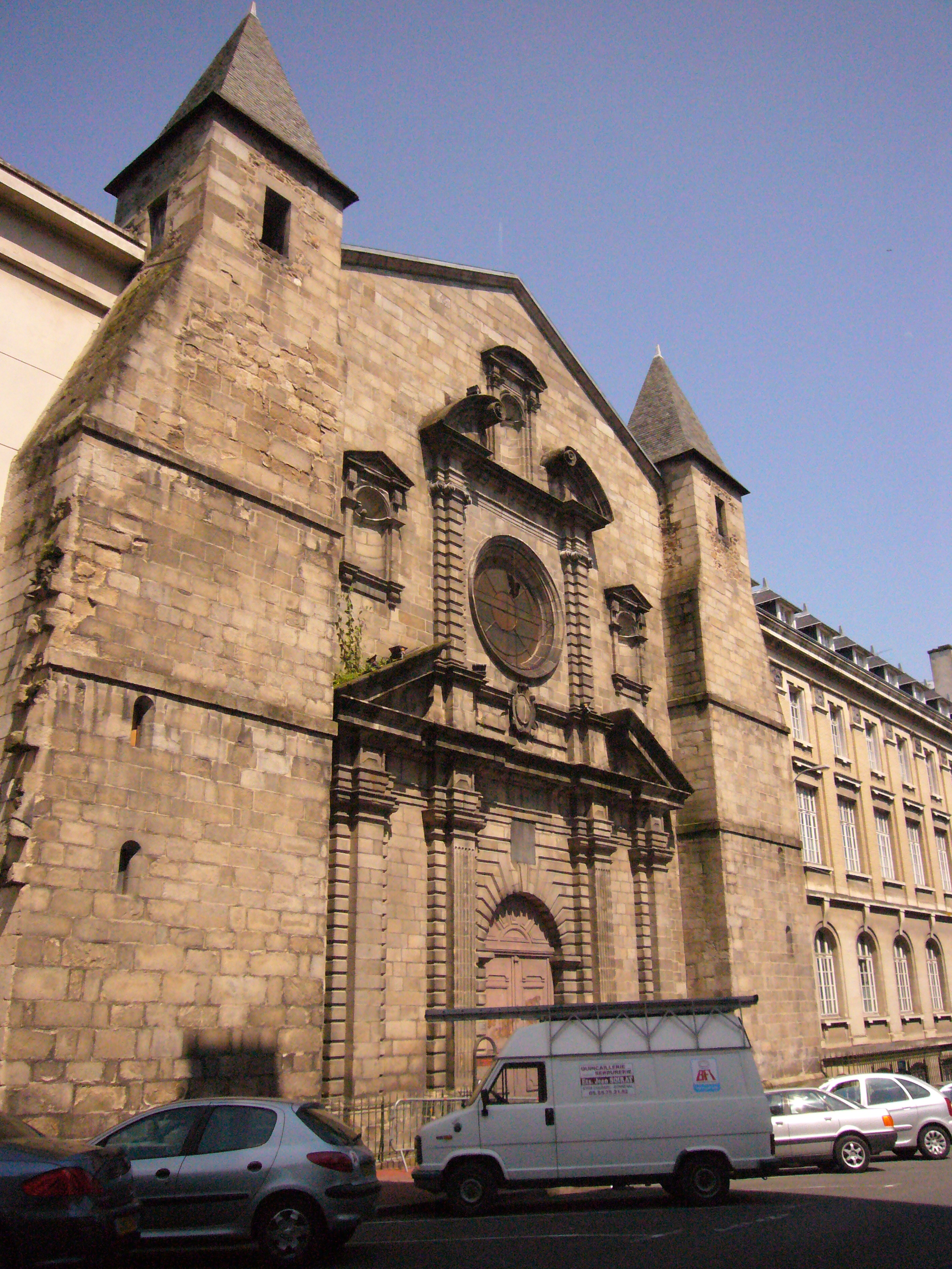 Chapelle du lycée Gay-Lussac de Limoges, ancien collège des Jésuites